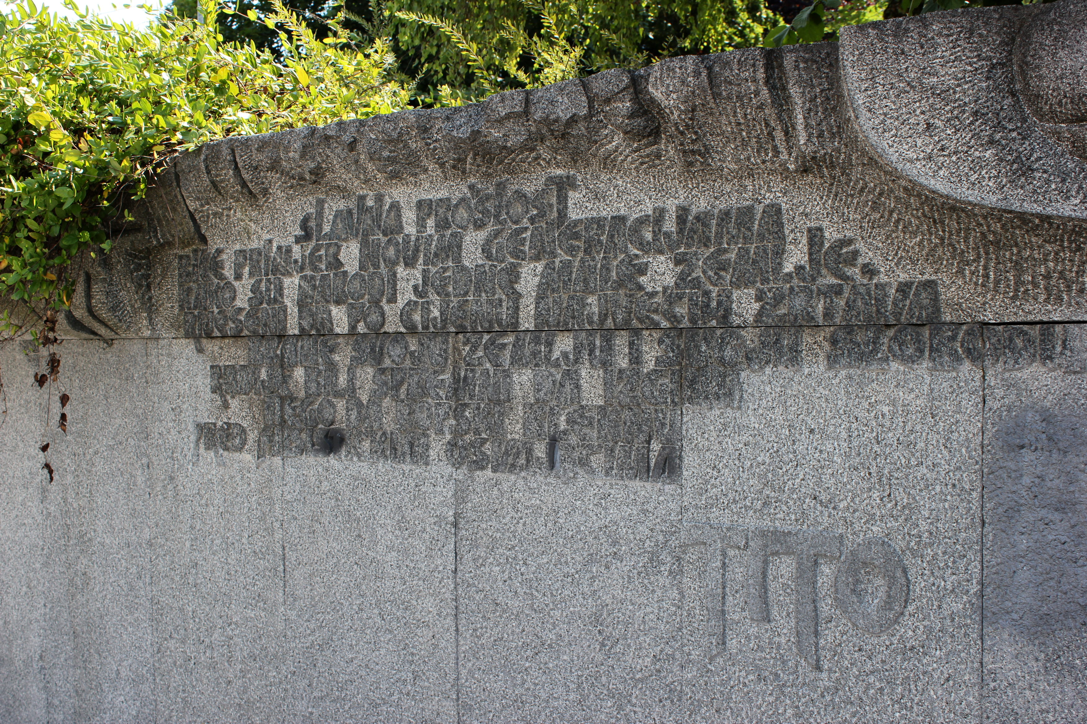 Denkmal im Spomen-park Vraca im Südwesten von Sarajevo.